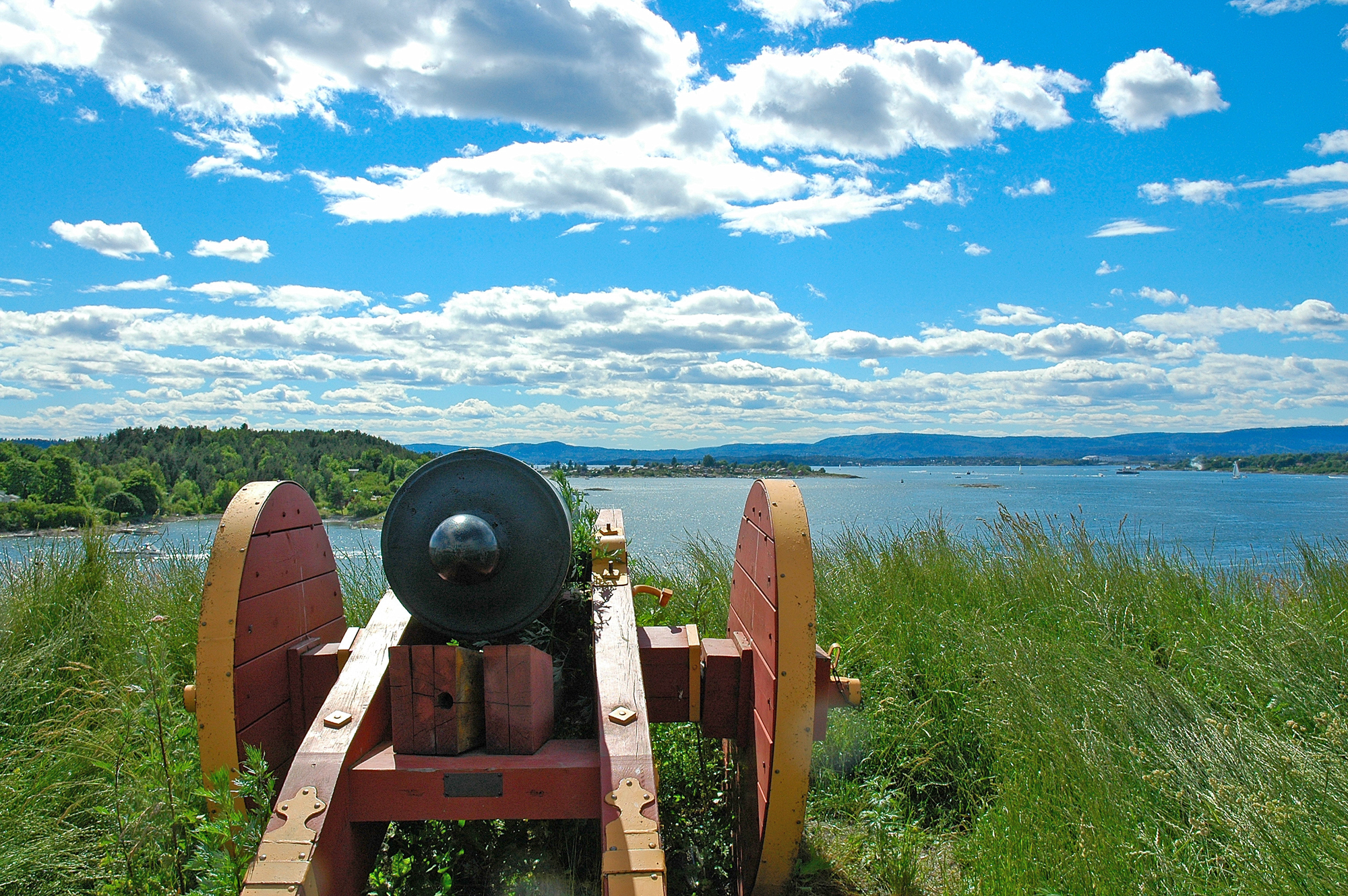 Old guns on Hovedøya island, Oslo, Norway